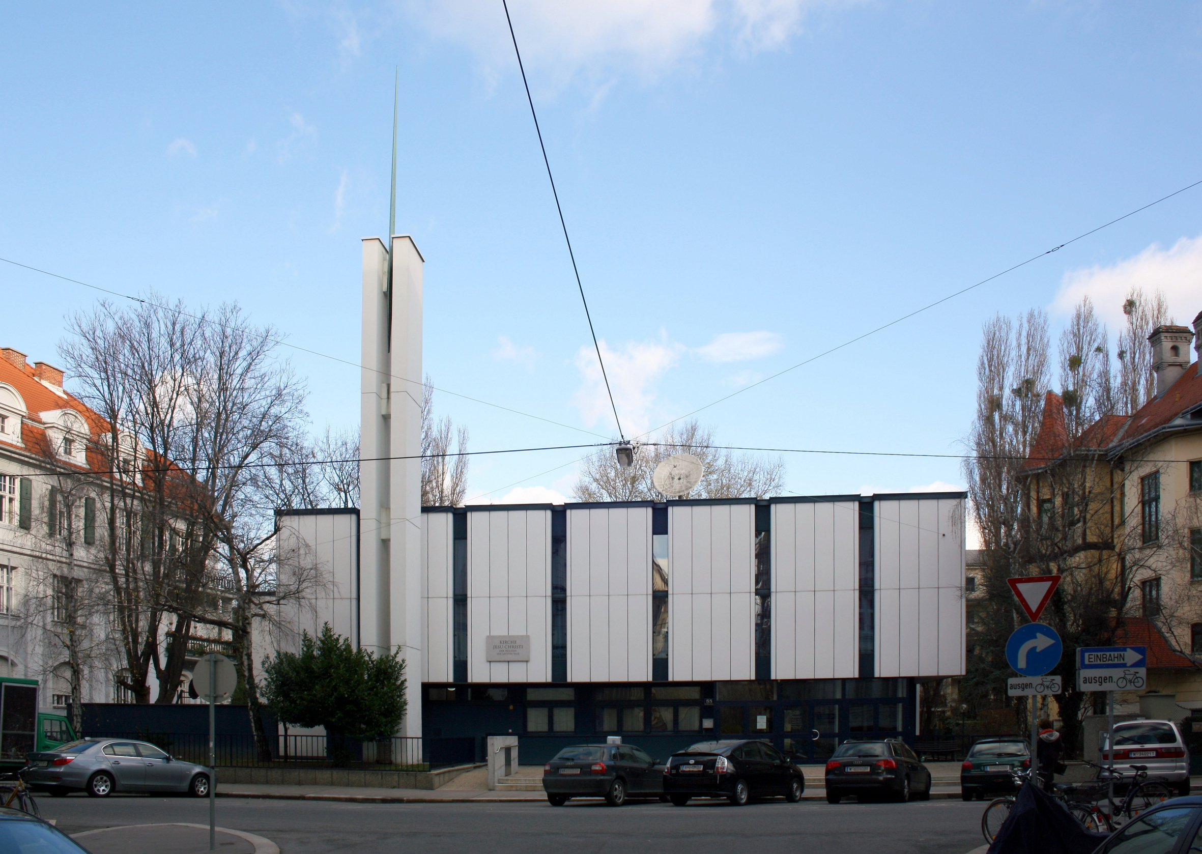 Das Gemeindehaus der Kirche Jesu Christi der Heiligen der Letzten Tage in der Böcklinstraße 55 im 2. Wiener Gemeindebezirk Leopoldstadt.